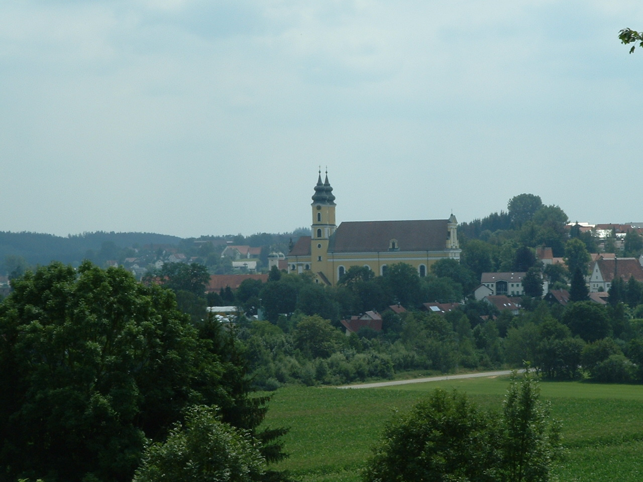 Rot an der Rot Abbey